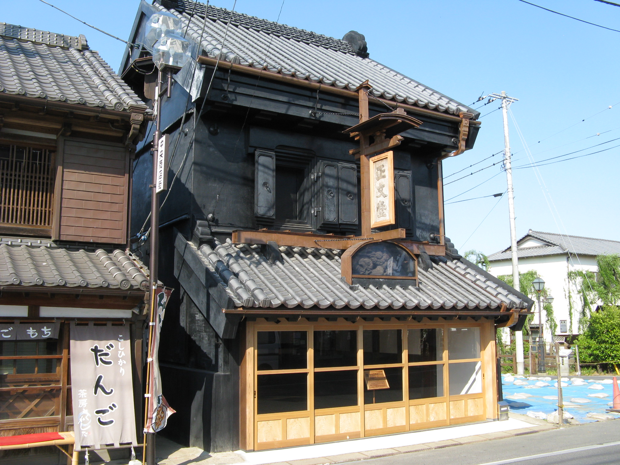 千葉県香取市の正文堂書店。2013年。